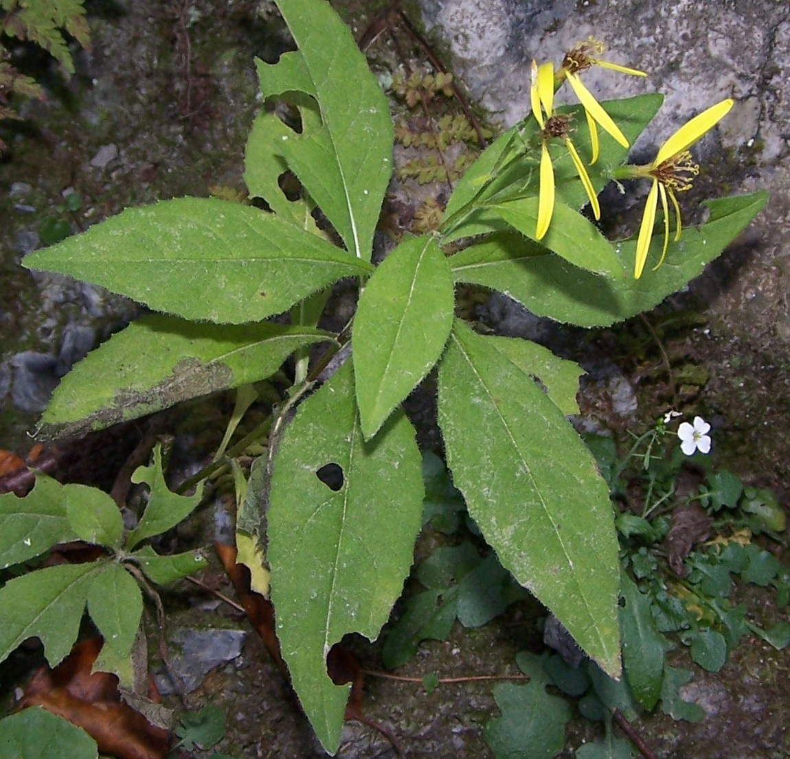 Senecio nemorensis subsp. nemorensis (pl. starzec gajowy), habitat: Pieniny, Wąwóz Homole